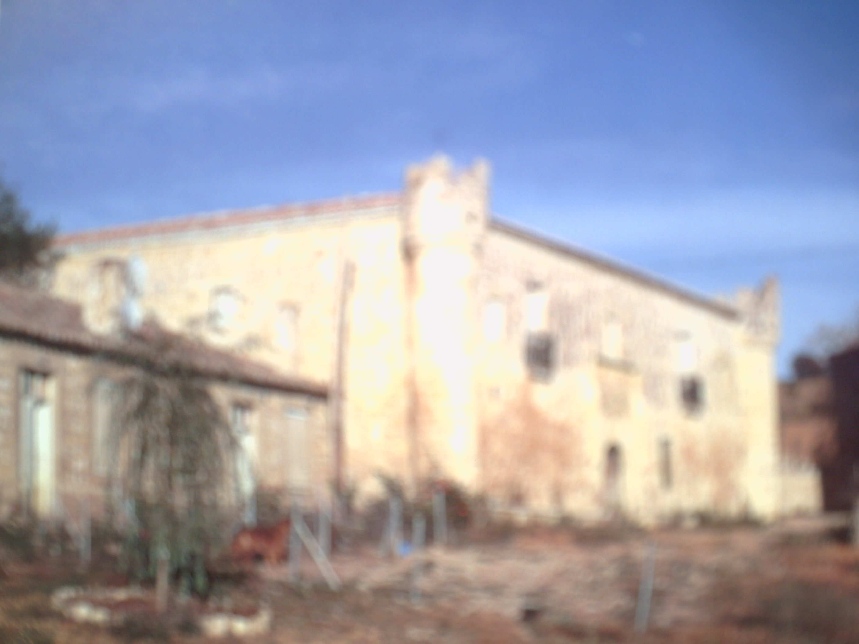 San Cebrian de la Buena Madre.